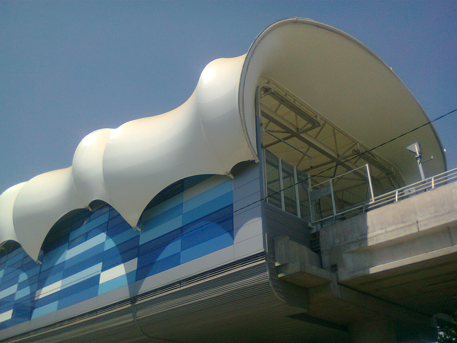 La tensoestructura blanca, diseñada por Cidelsa y confeccionada con Precontraint 902 S, material producido por Ferrari, cubre la estación Monte Tabor. Línea 5 del Metro de Santiago, comuna de Maipú, Chile.